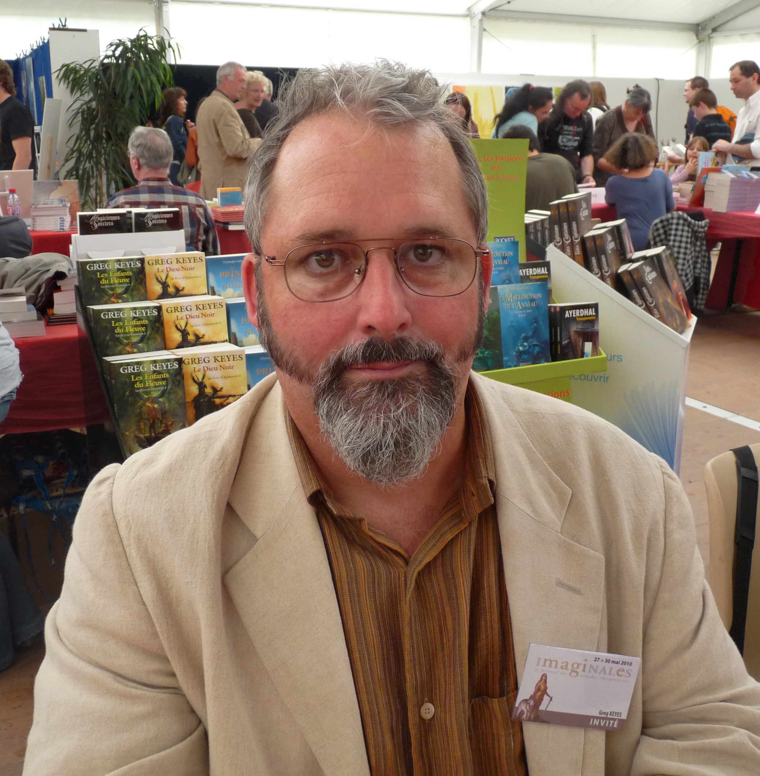 L'écrivain américain Greg Keyes (Imaginales 2010, Epinal, France)